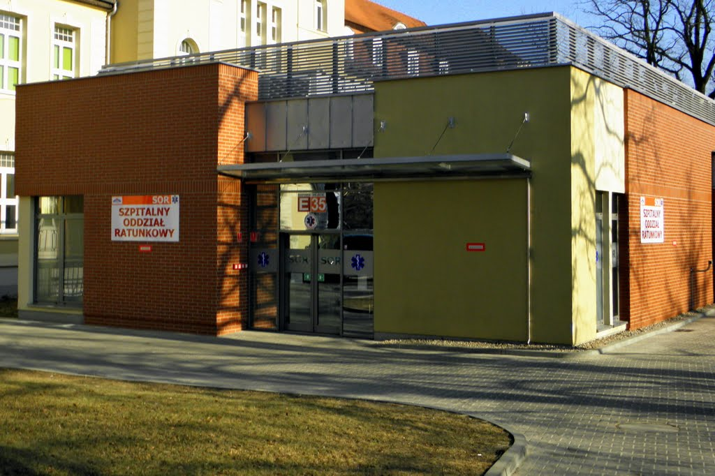 SOR Szpitala Powiatowego SPW ZOZ